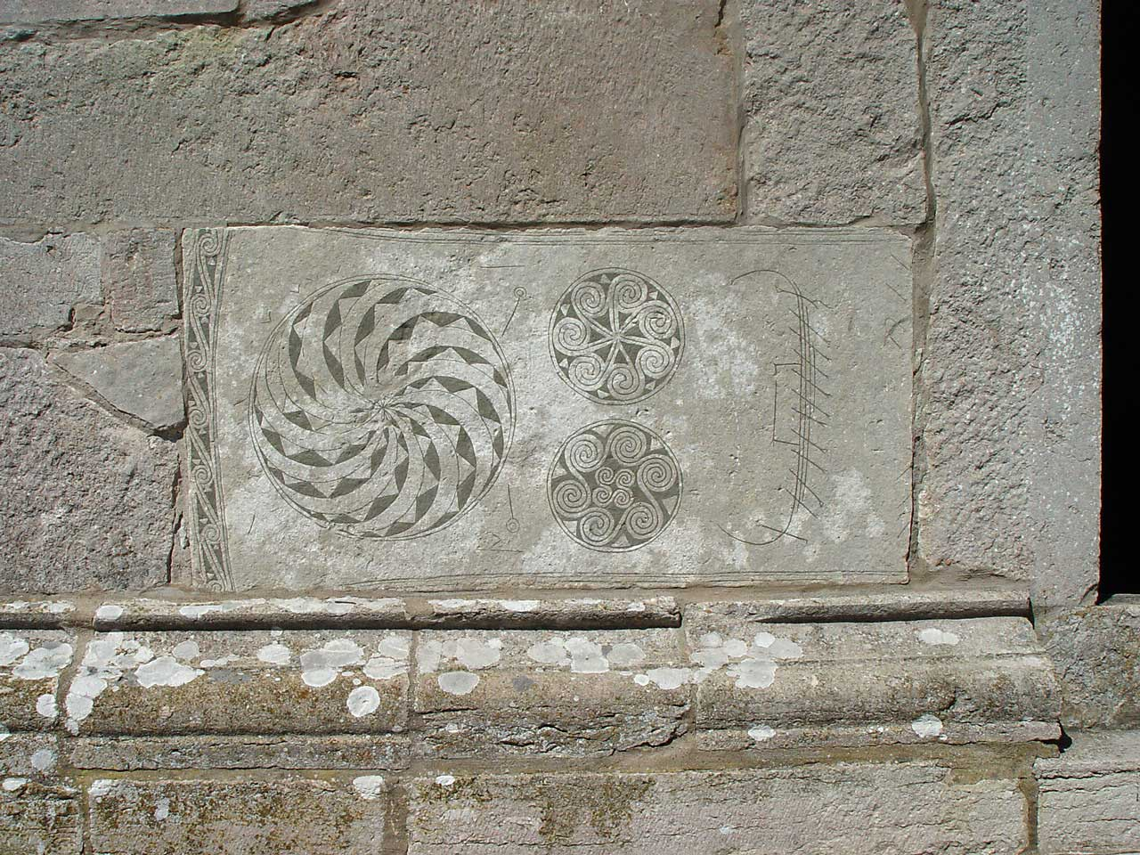 Bildstein in der Bro kyrka (Gotland). Bildstein in der Südwand (5.Jh)